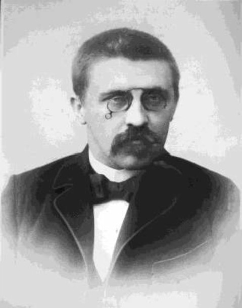 Rudolf Kuchynka (1869 - 1925), Český historik.